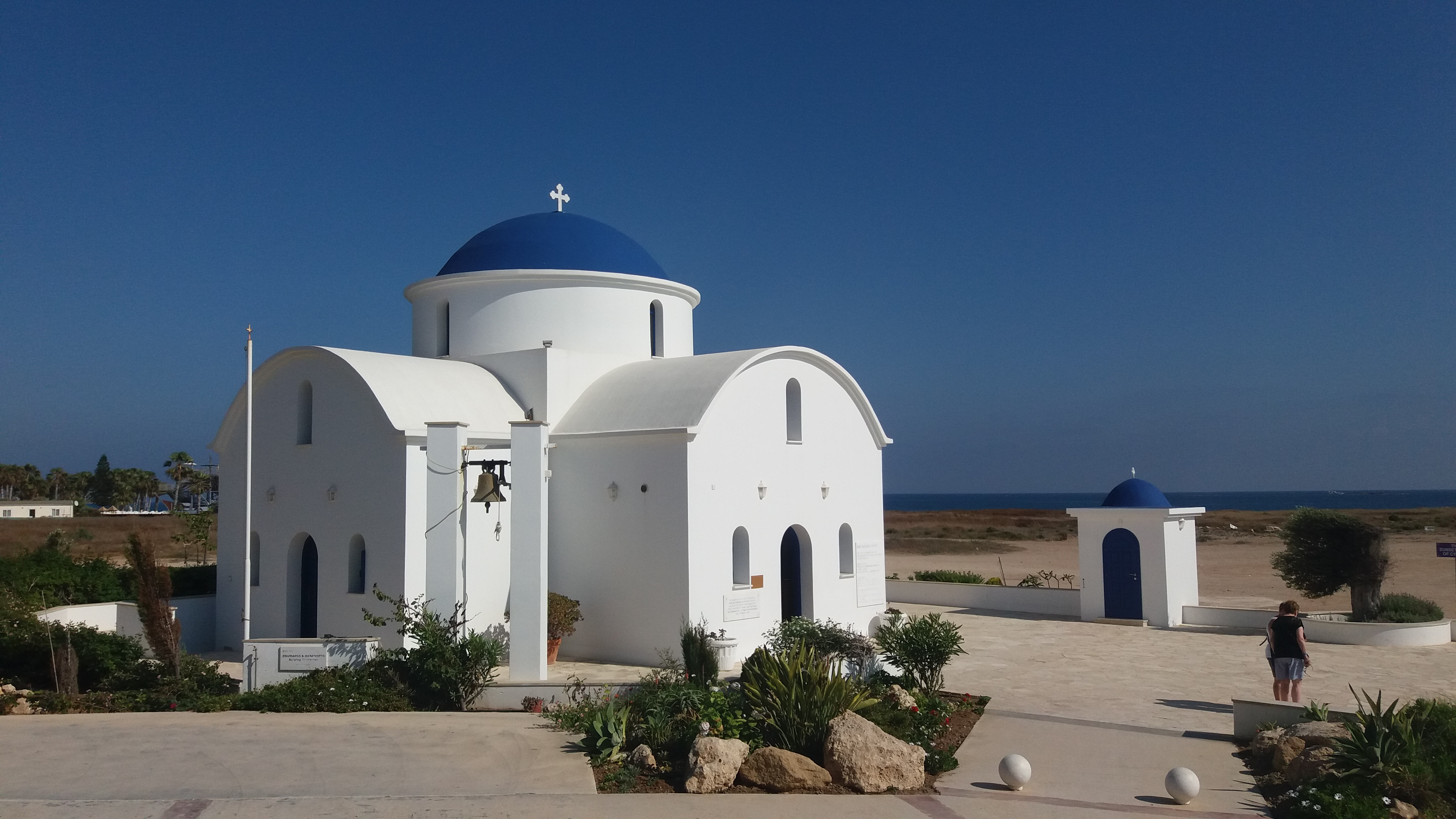 Sankt Nikolaus kyrka i Pafos.